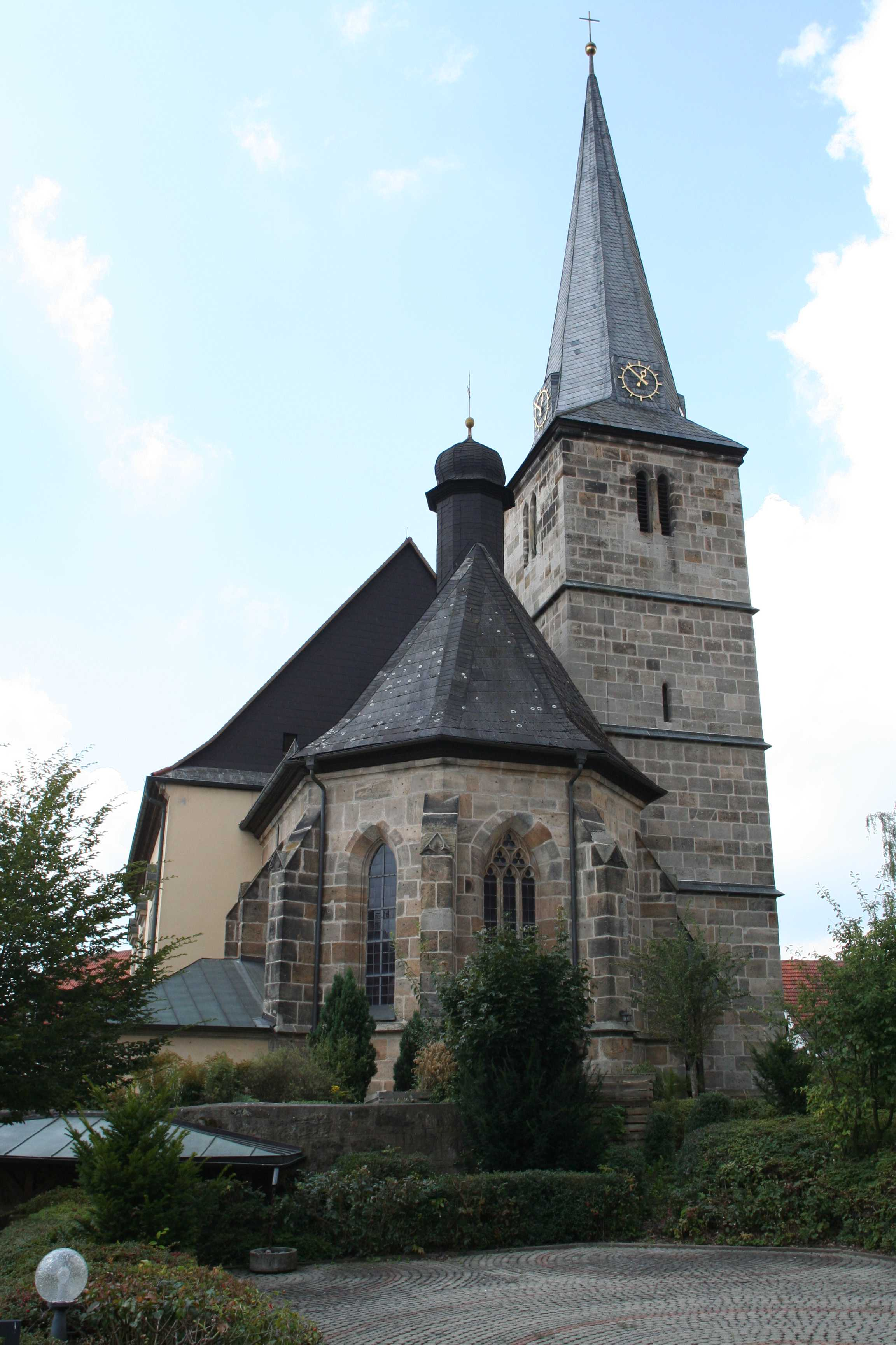 Kath. Pfarrkirche St. Michael Marktzeuln im Landkreis Lichtenfels in Bayern